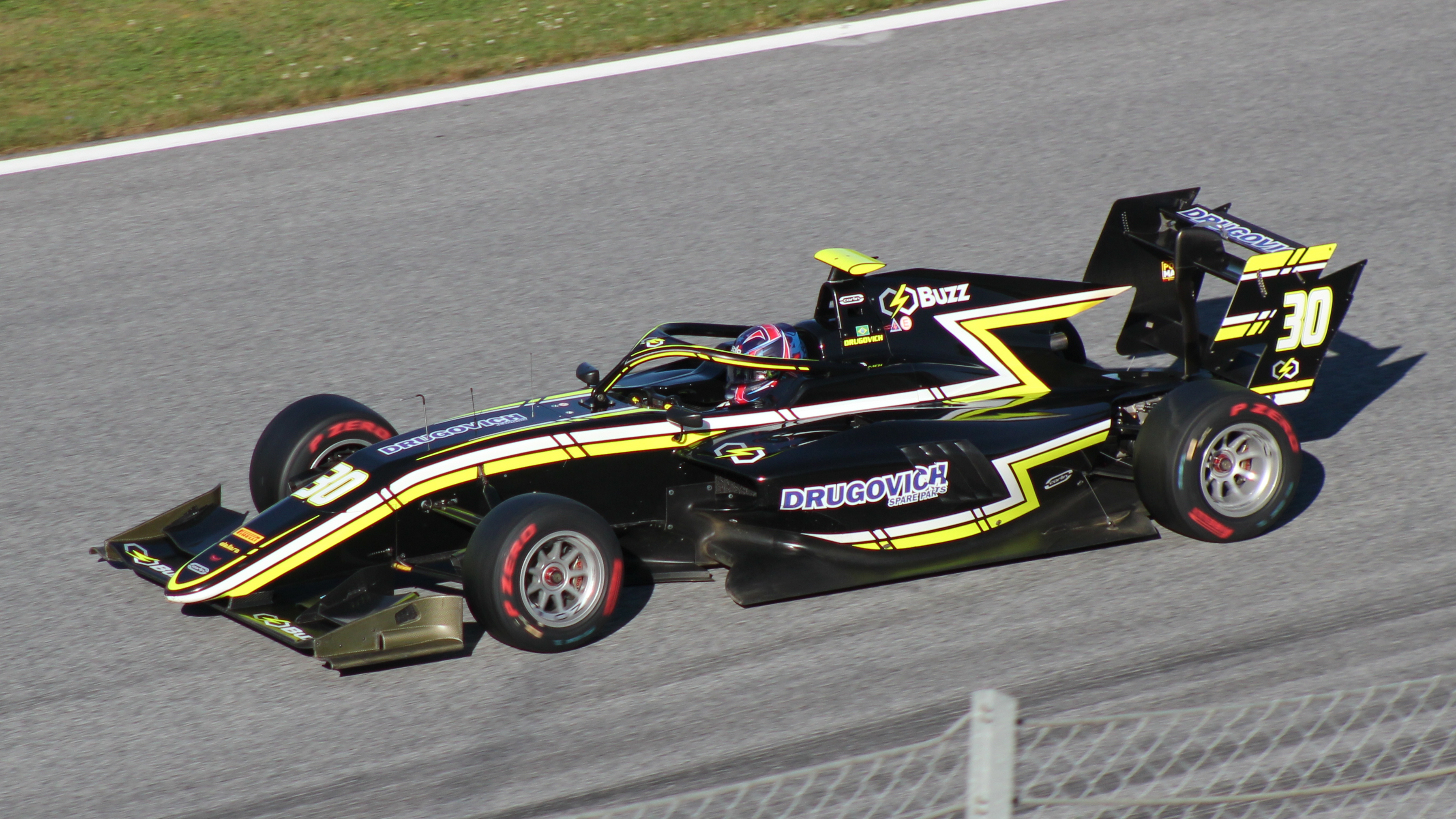 Drugovich beim Rennwochenende in Österreich 2019